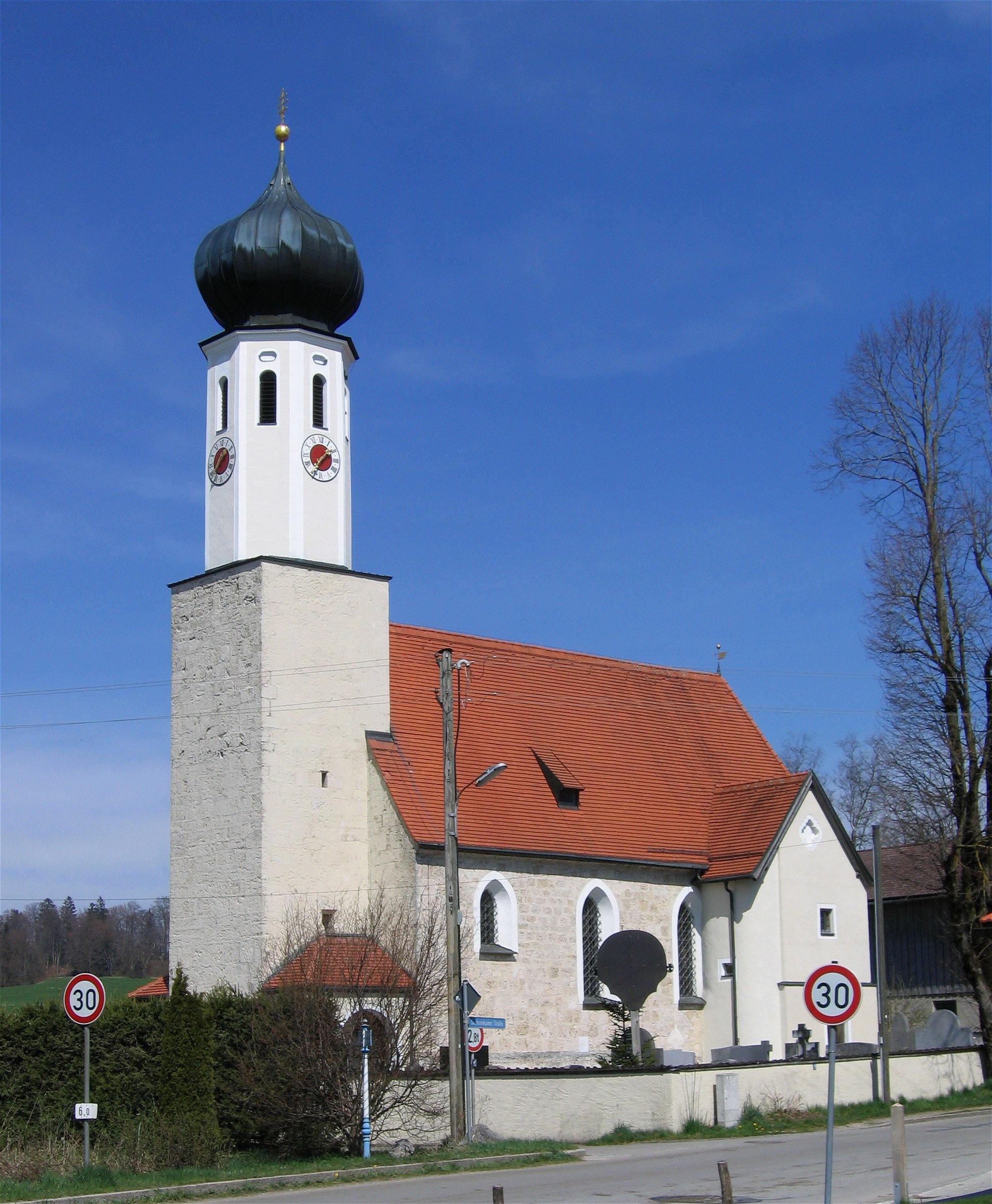 Piesenkam, Waakirchen; Katholische Filialkirche St. Jakobus d. Ä., 15./16. Jahrhundert, im 18. Jahrhundert barockisiert.